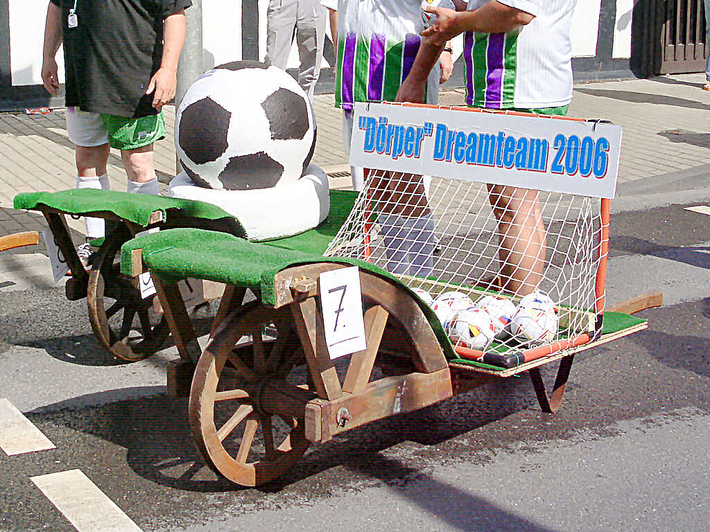 Schürreskarrenrennen Rösrath-Forsbach